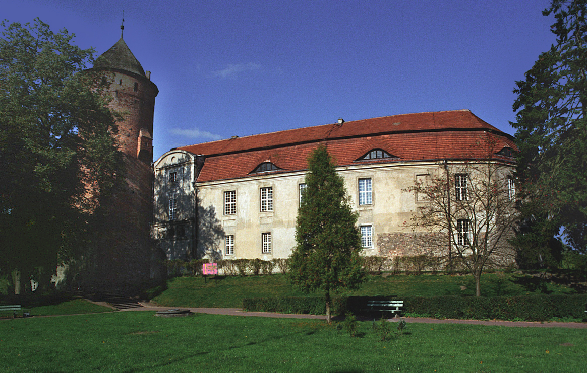 Świdwin